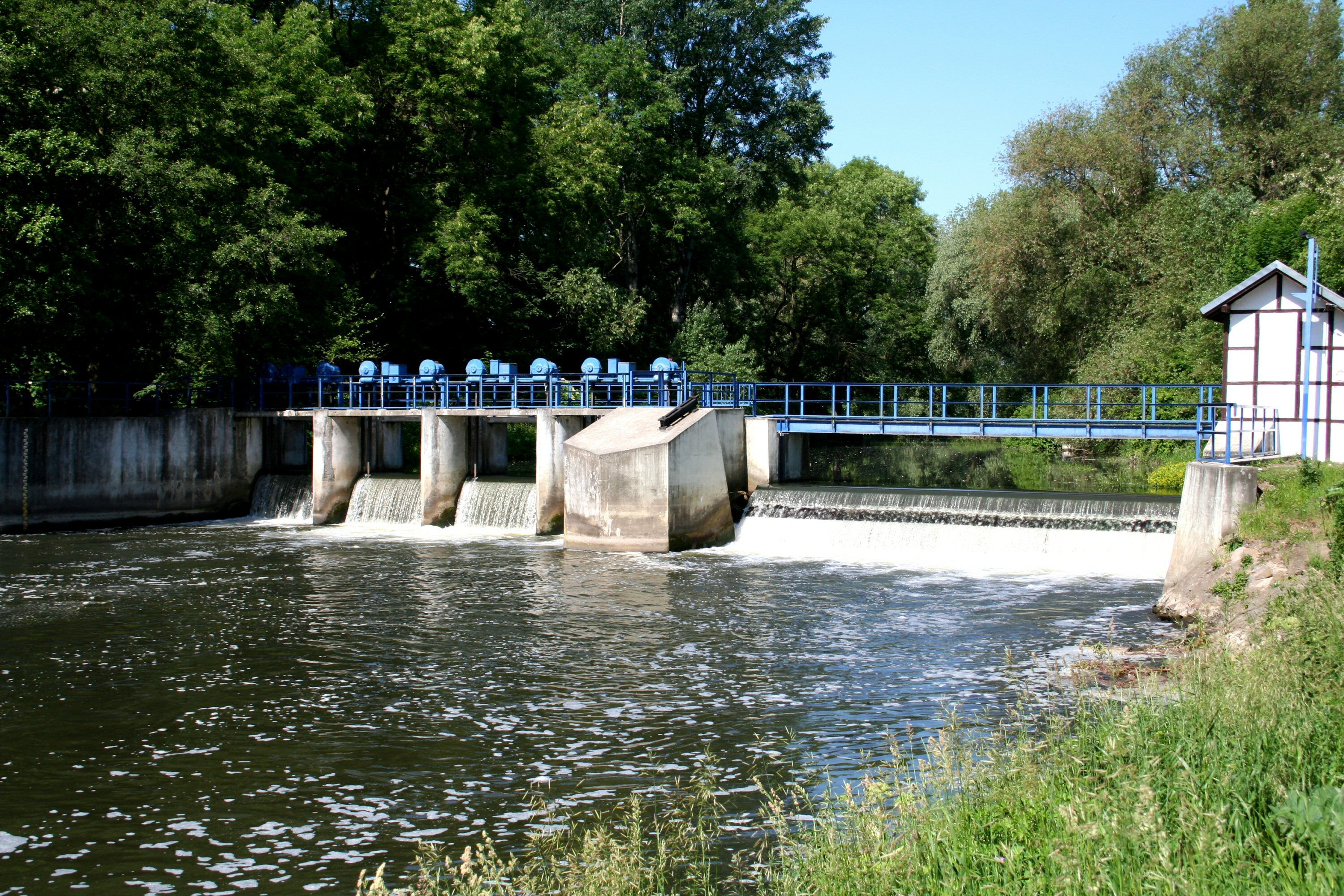 Das Wehr in Staßfurt